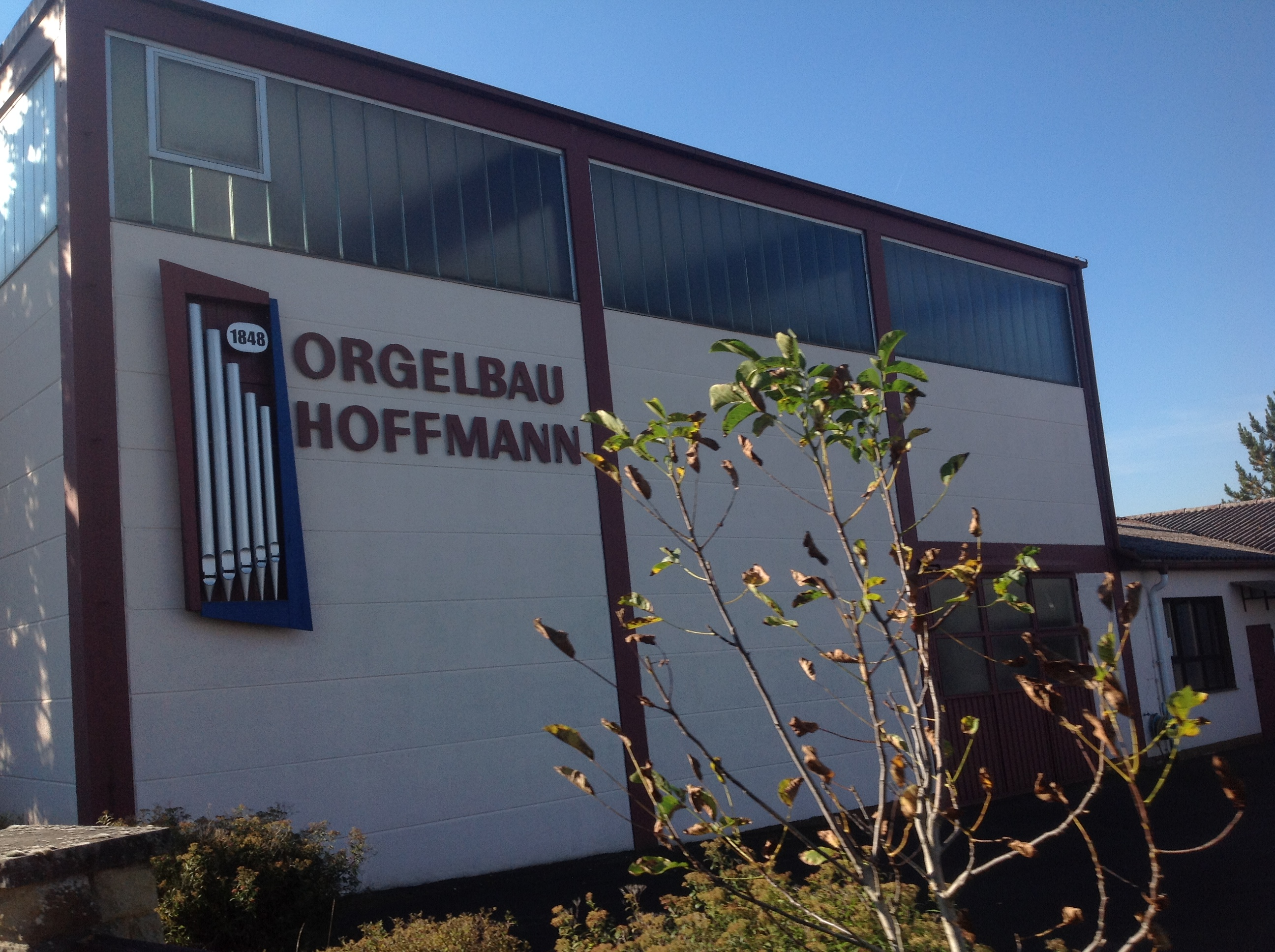 Das Lagergebäude der Firma "Orgelbau Hoffmann und Schindler" aus dem Jahr 2013. Auf dem Bild ist das mittlerweile alte Logo der Firma zu sehen.